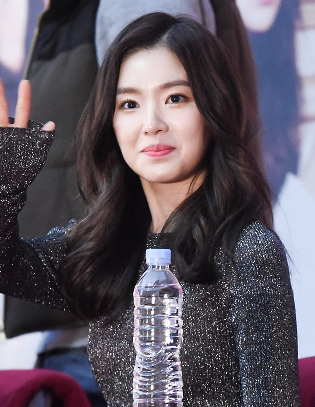 Irene Bae at a fanmeet in Incheon on March 19, 2016.